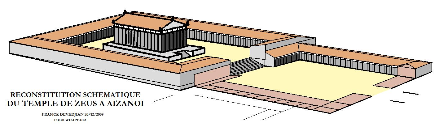 Description reconstitution schématique du sanctuaire de Zeus à AizanoiDate 20 December 2009Source personnelle à l'auteurAuthor Franck Devedjian reconstitution schématique du sanctuaire de Zeus à Aizanoi